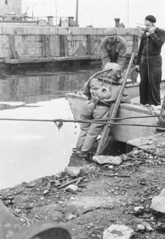 S.S.R. Estland, Raval 13.9.1941 Estnischer Selbstschutz. Aufräumungsarbeiten im Hafen von Reval [Tallin]. Taucher bei der Bergung von Wrackstücken im Hafenbecken. Taucher steigt vom Boot ins Wasser. Neg.Nr.: M.244/4 von H.F. [Heeresfilmstelle]